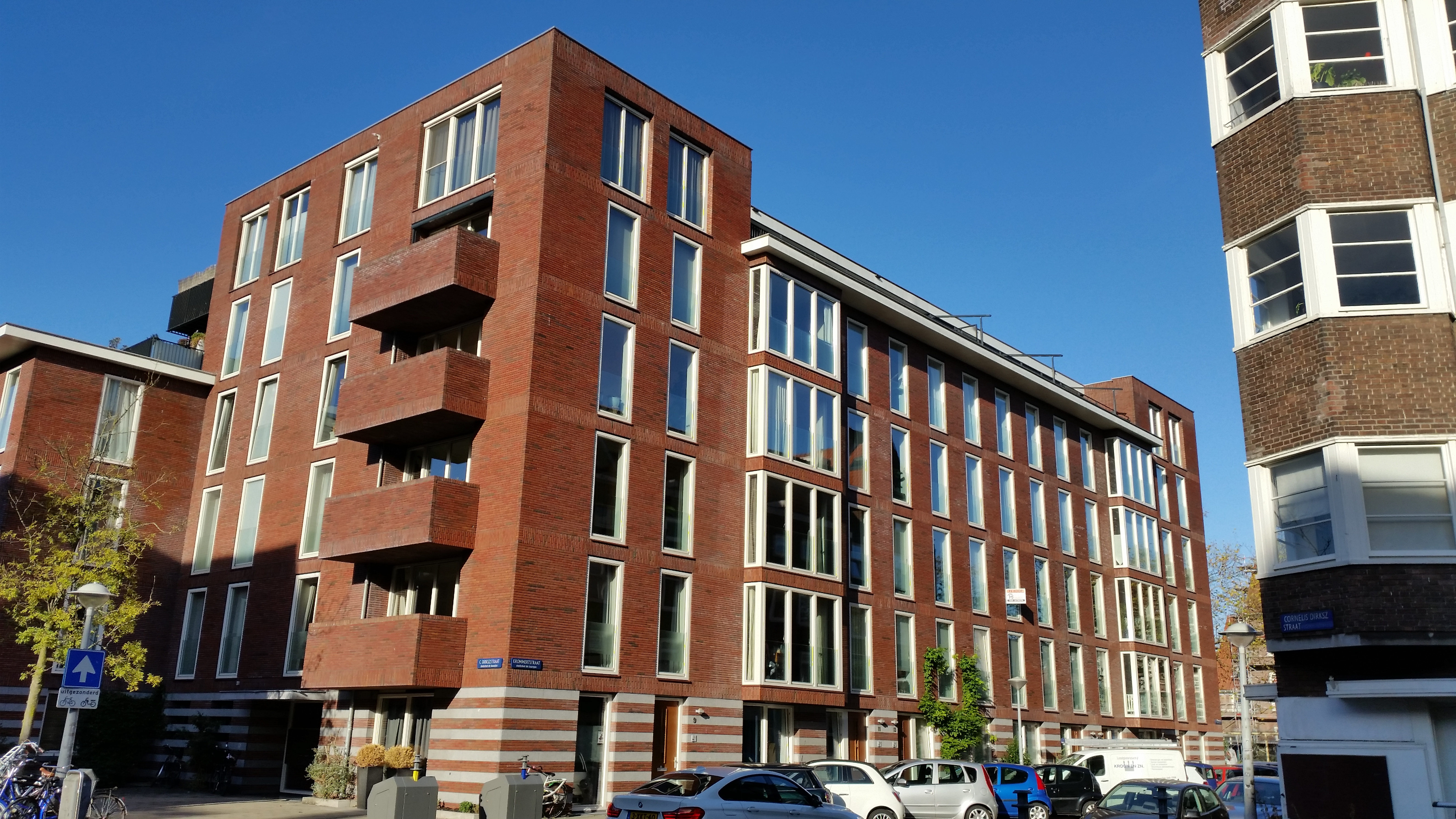 Krommertstraat 9-19 op de plaats van het Sportfondsenbad